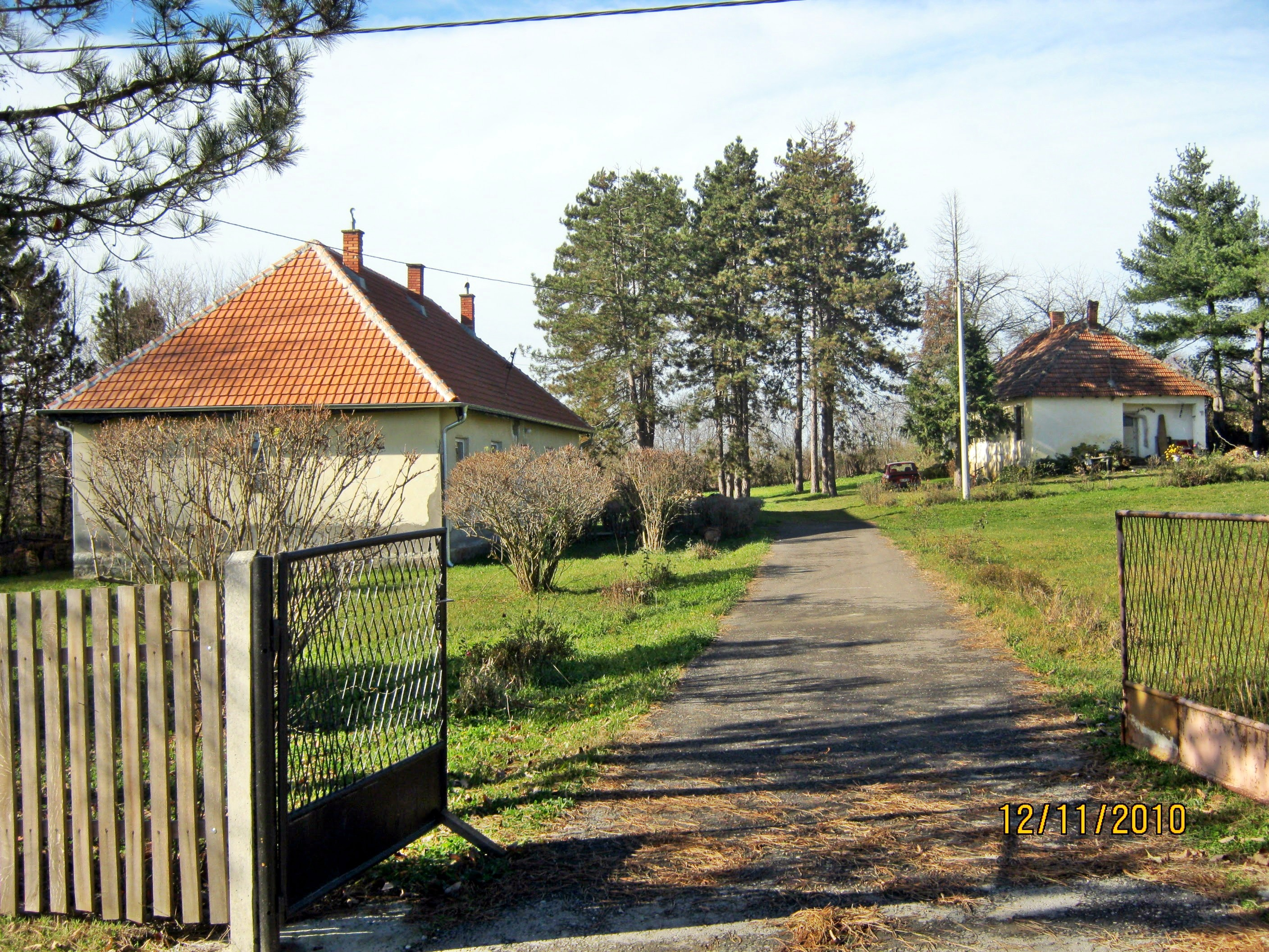 Osnovna škola na ovom mestu napravljena polovinom XX veka